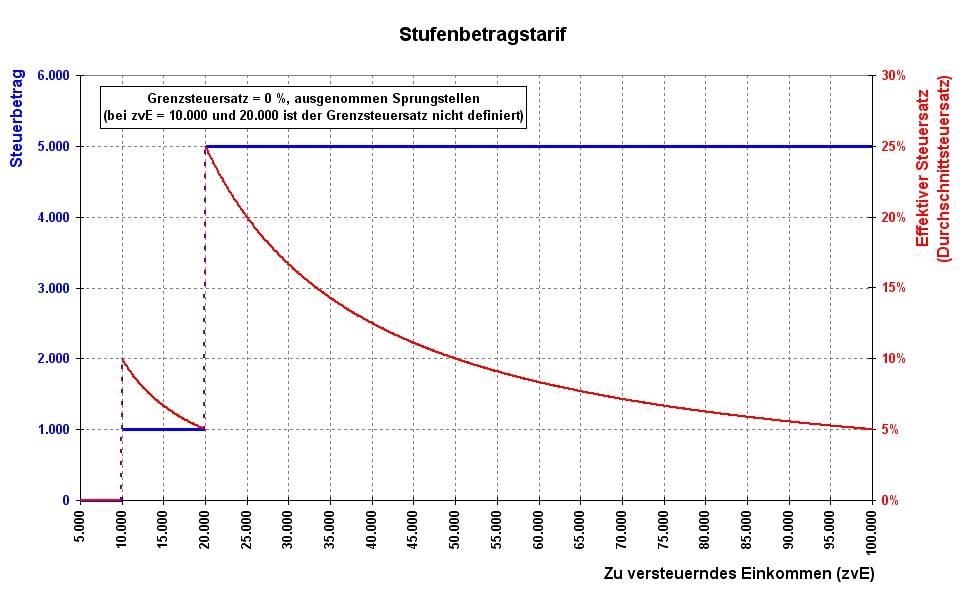 Beispiel für einen Stufenbetragstarif: Die blaue Linie zeigt den Verlauf der Steuerbetragsfunktion (dazu linke Skala). Die rote Linie zeigt den degressiven Verlauf des effektiven Steuersatzes (rechte Skala).